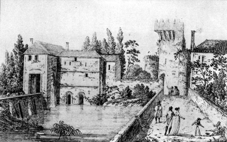 Les remparts de Senlis avec la tour César et le passage des Carmes. Le bâtiment à gauche doit être le moulin des Carmes, détruite pendant la bataille de Senlis le 2 septembre 1914. Selon Claude Finon, qui a repris la gravure dans son recueil, le dessinateurs a pris quelques libertés.